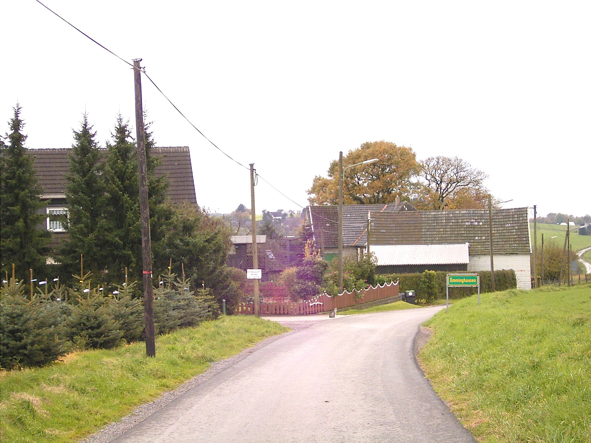 Radevormwald